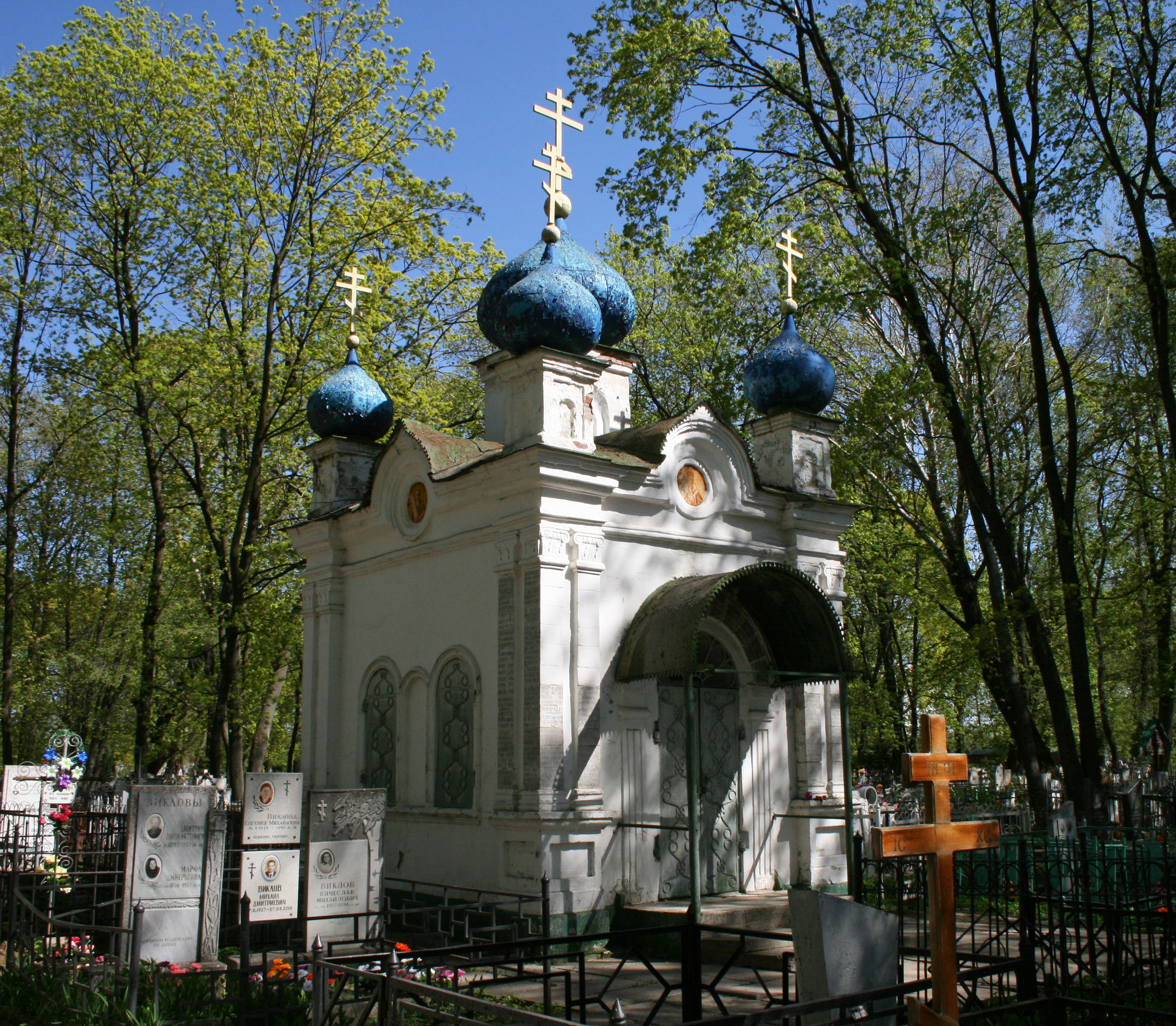 Часовня Николая Чудотворца на Скорбященском кладбище Рязани